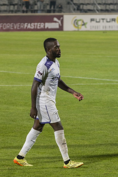 Daniel Gbaguidi durant le match Istres-Marseille Consolt